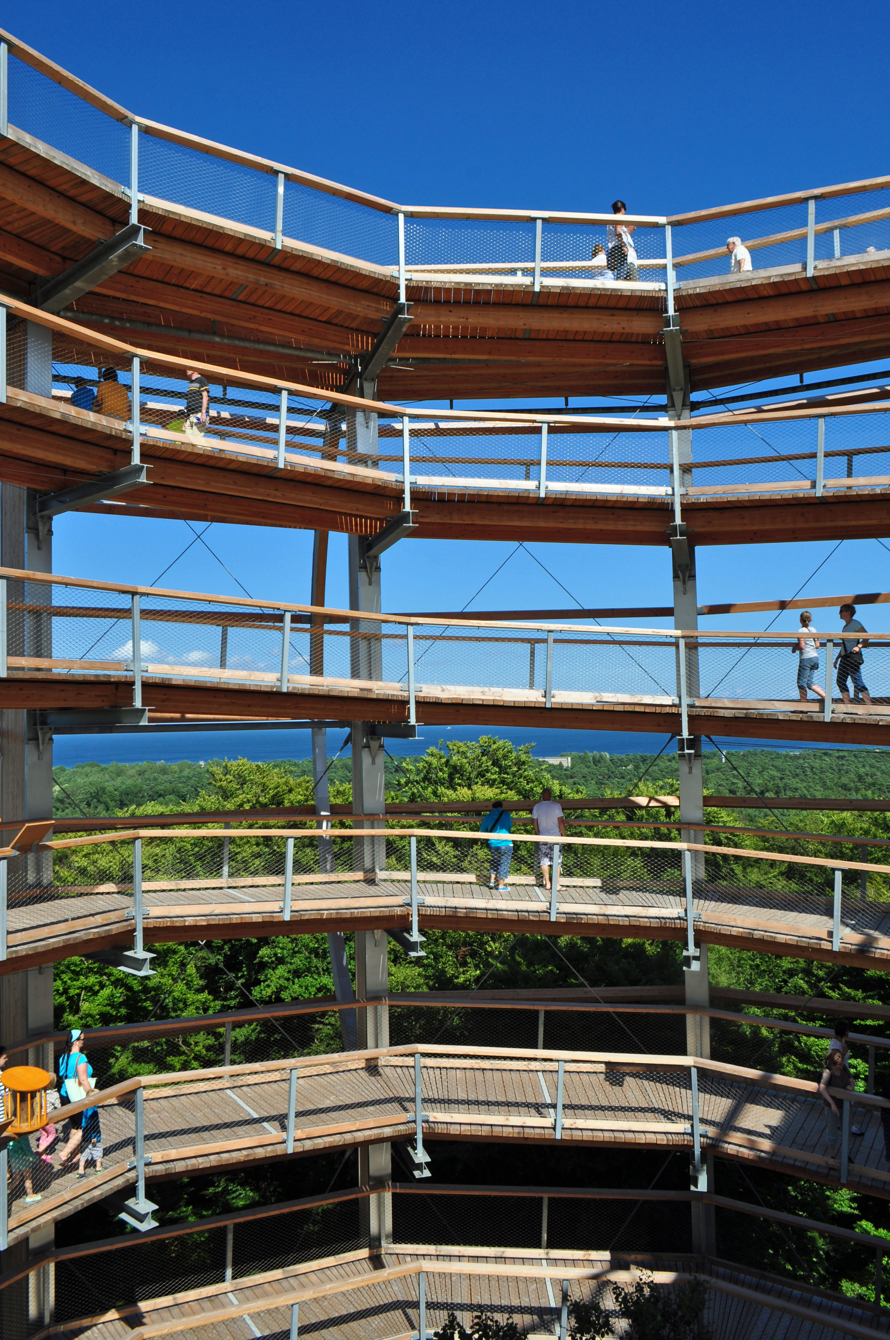 Foto aufgenommen am 31.7.2013 auf dem Gelände des Naturerbe-Zentrums auf der Insel Rügen, "Baumwipfelpfad".. Beschreibung siehe Dateiname. im Turm, Ausblick vom Turm am Baumwipfelpfad im Naturerbe-Zentrum Rügen